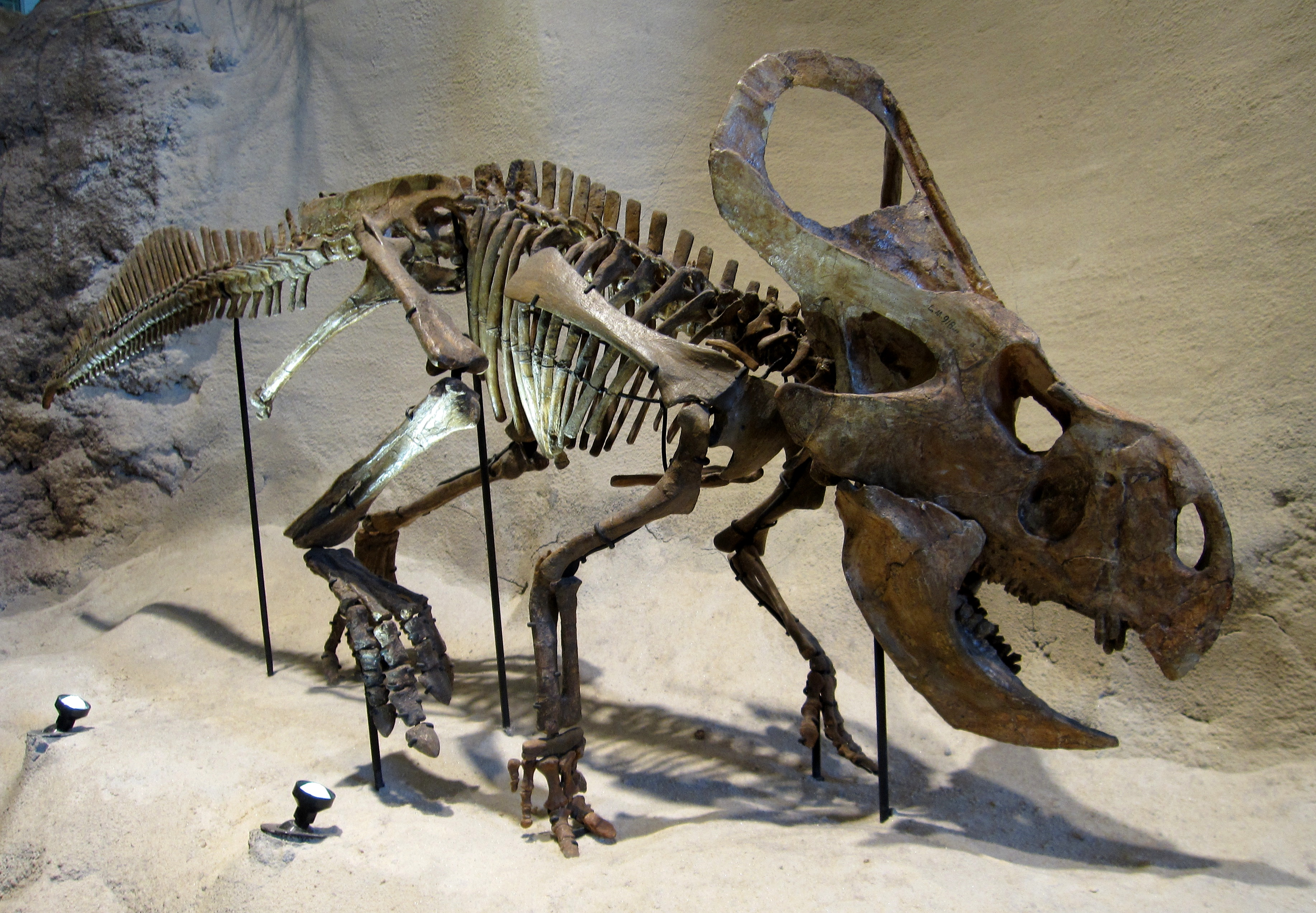 protoceratops